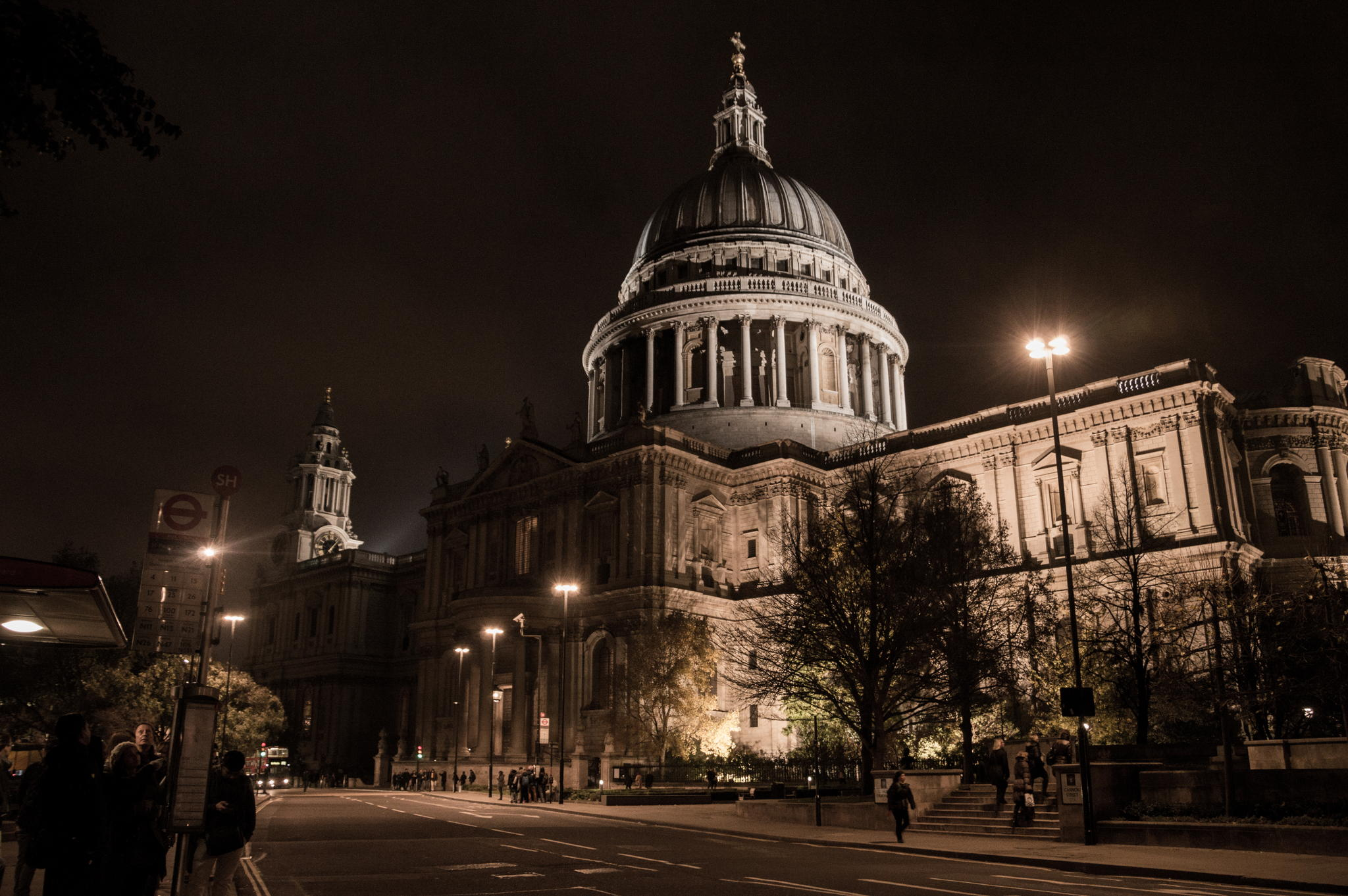 Собор Святого Павла вечером